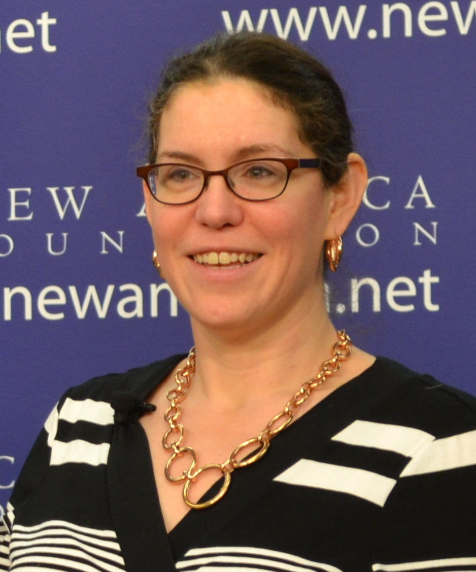 Fuzz Hogan and Megan McArdle